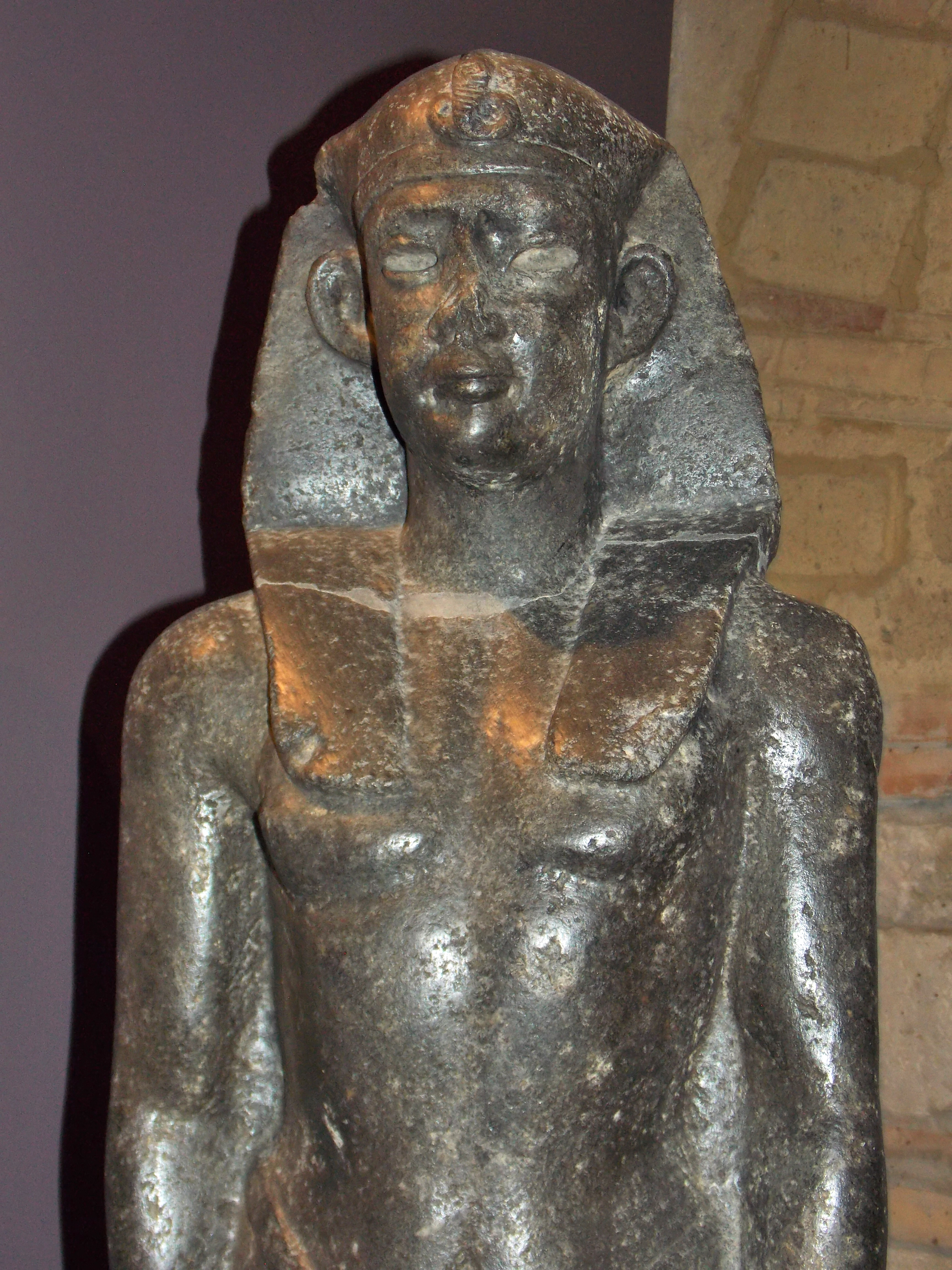 Un reperto del tempio di Iside di Benevento conservato nella sezione egizia del Museo del Sannio, presso il museo ARCOS. Domiziano in figura di faraone.